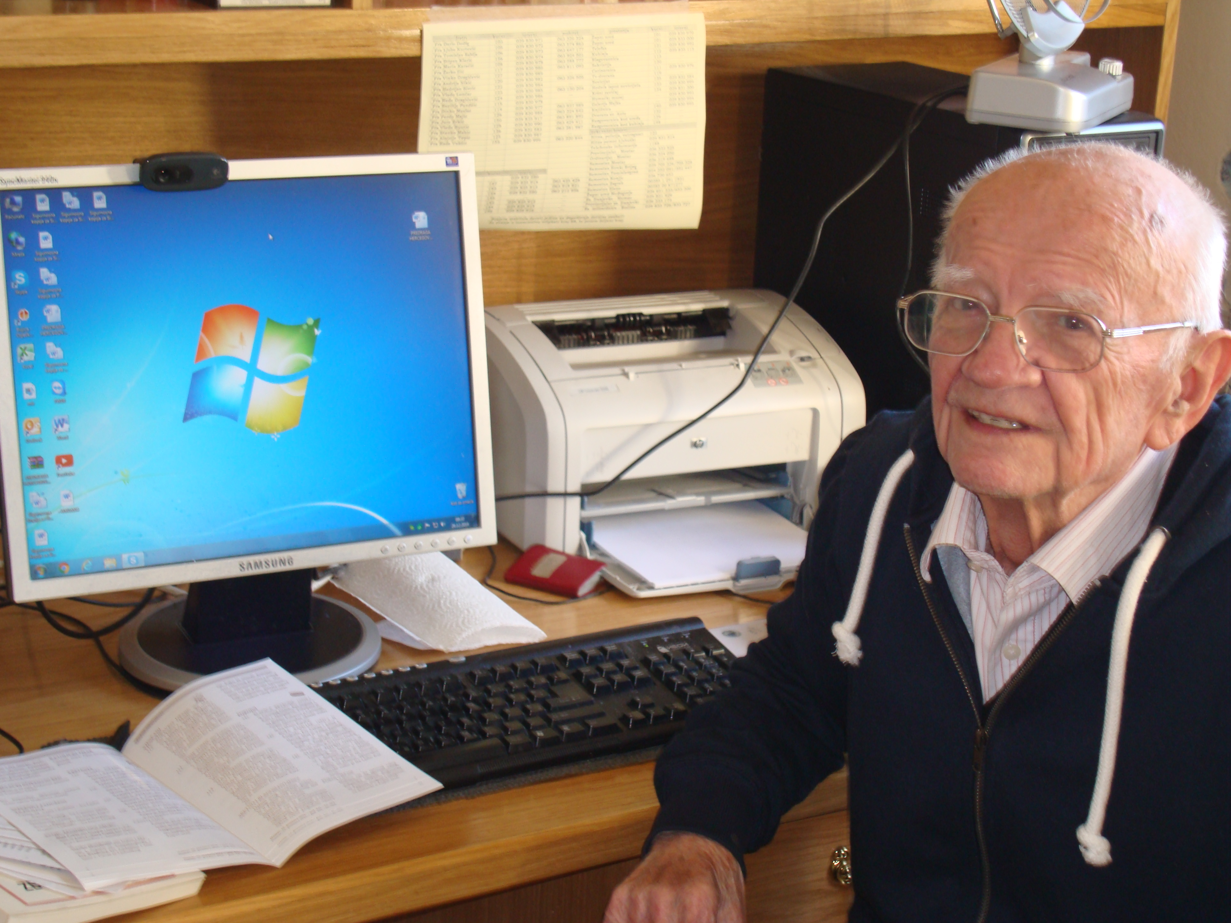 Bazilije Stjepan Pandžić --- Humac (Ljubuški) --- 2011-06-24 Bazilije Pandžić (također fra Bazilije Stjepan Pandžić) (Drinovci, Bosna i Hercegovina, 30. siječnja 1918.) je poznati hrvatski povjesničar, arhivar i orijentalist iz Hercegovine. Basil Stephen Pandžić (also Fr. Basil Pandžić), (* 30 January 1918, Drinovci, Bosnia and Herzegovina) is a famous Croatian historian, archivist and orientalist from Herzegovina. Basilius Pandžić (Croatice: Bazilije Pandžić; natus die 30 Januario 1918 Drinovci) est Croatiae scriptor et litterarum cultor.